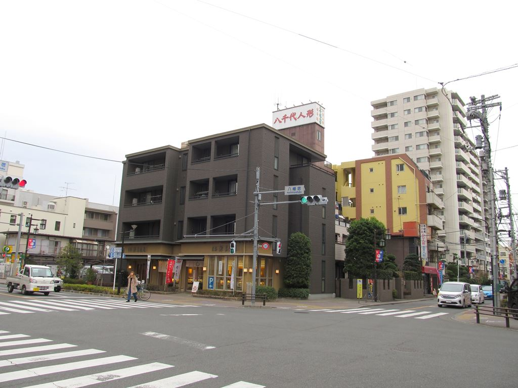 八幡宿交差点。鍋屋横丁。旧甲州街道。小金井街道。府中市八幡町。